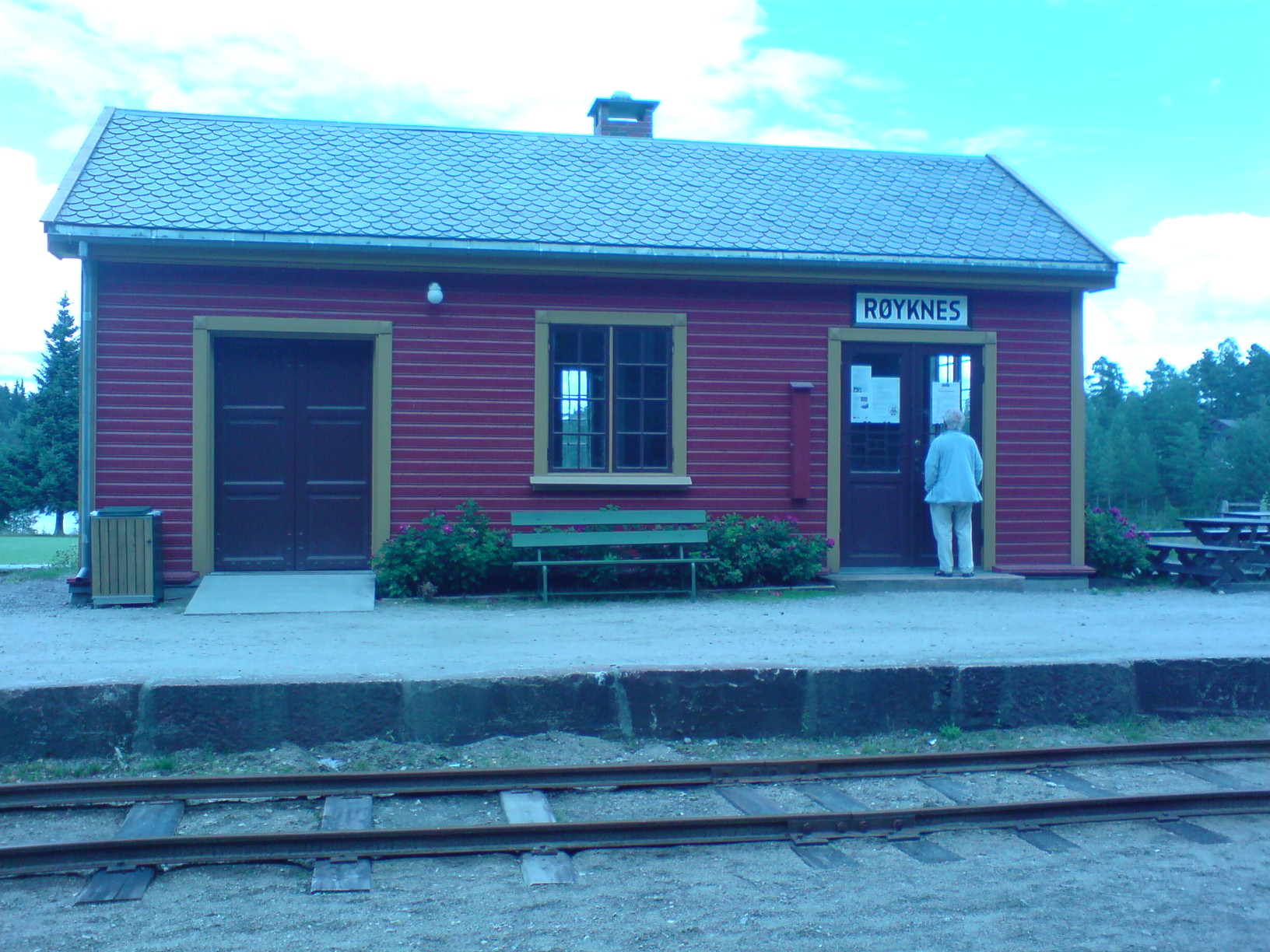 Røyknes stasjon på Setesdalsbanen.